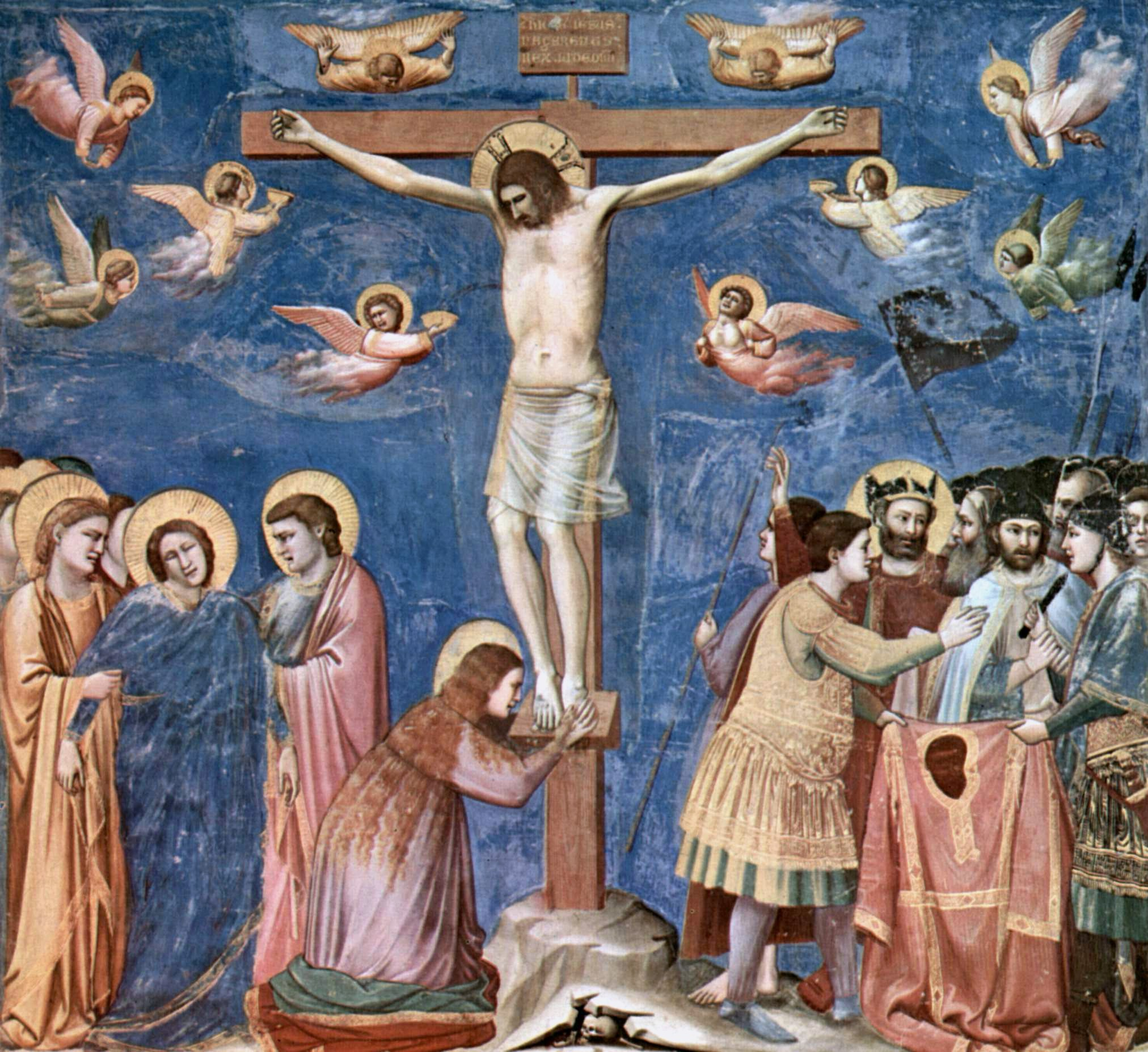 Giotto, fresco from Scrovegni Chapel, Crucifixion